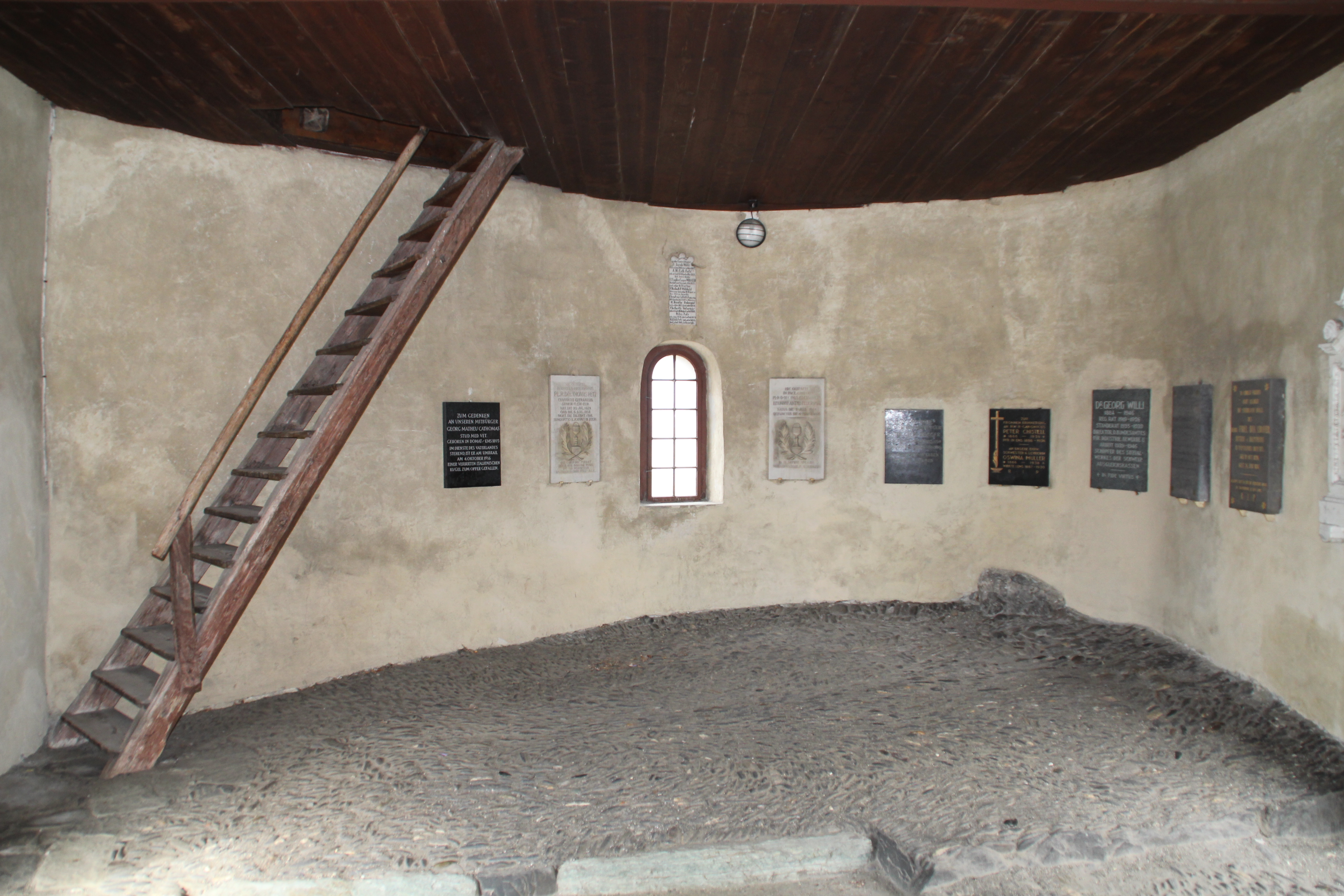 Ems)